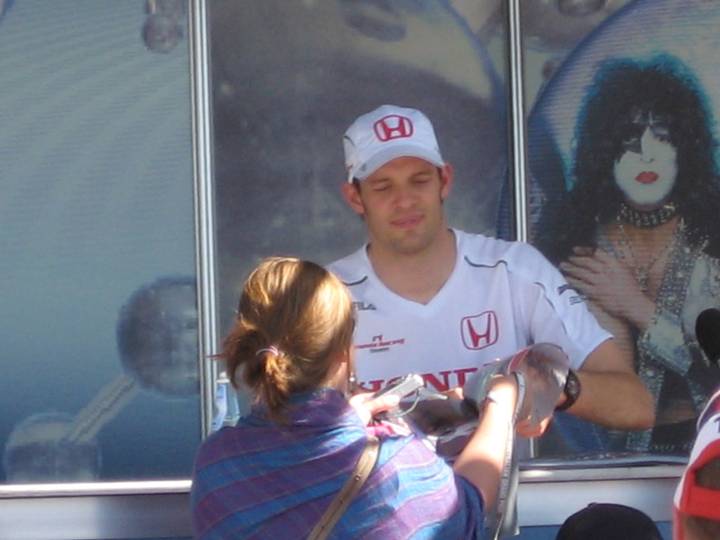 Alex Wurz